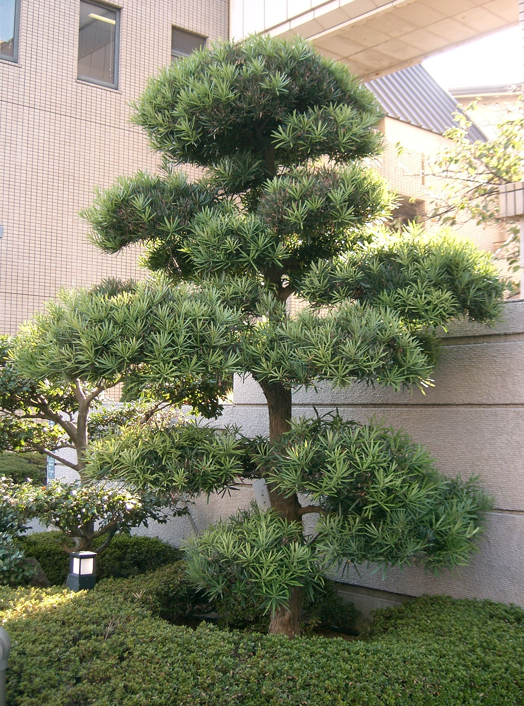 Podocarpus macrophyllus